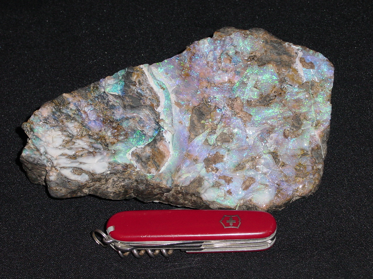 Opal from Boi Morto, Piaui, Brazil